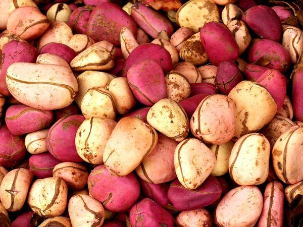 القورو